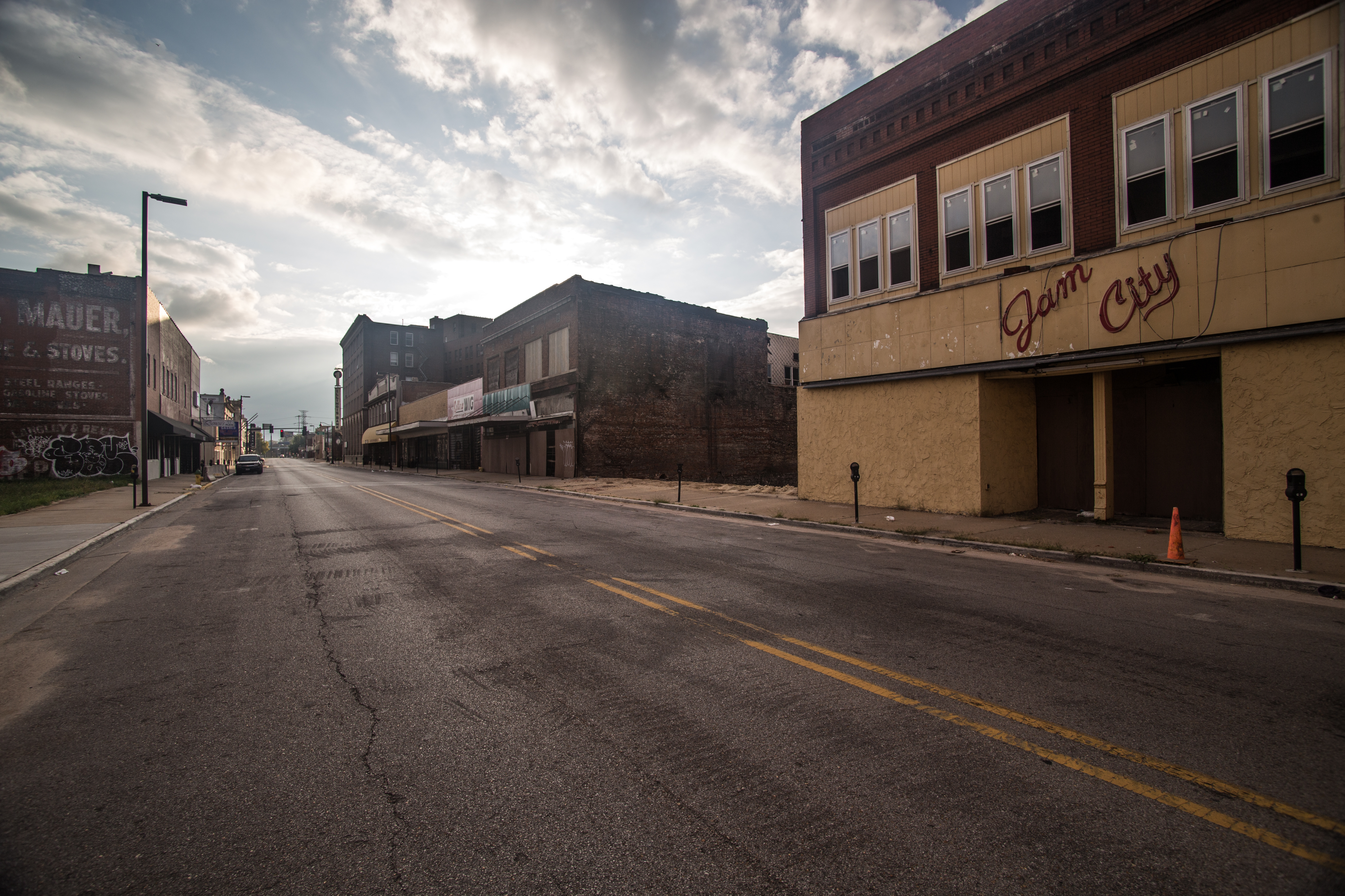 Collinsville Avenue